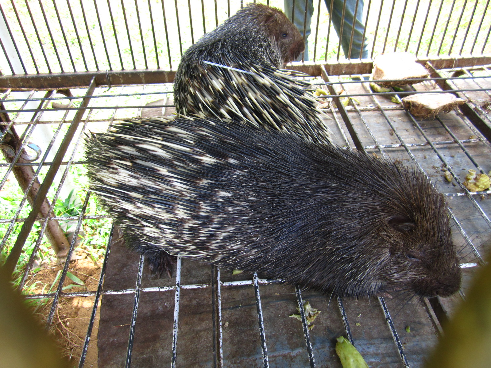 Landak jawa (Hystrix javanica) di Agrowisata Pagilaran, Batang.